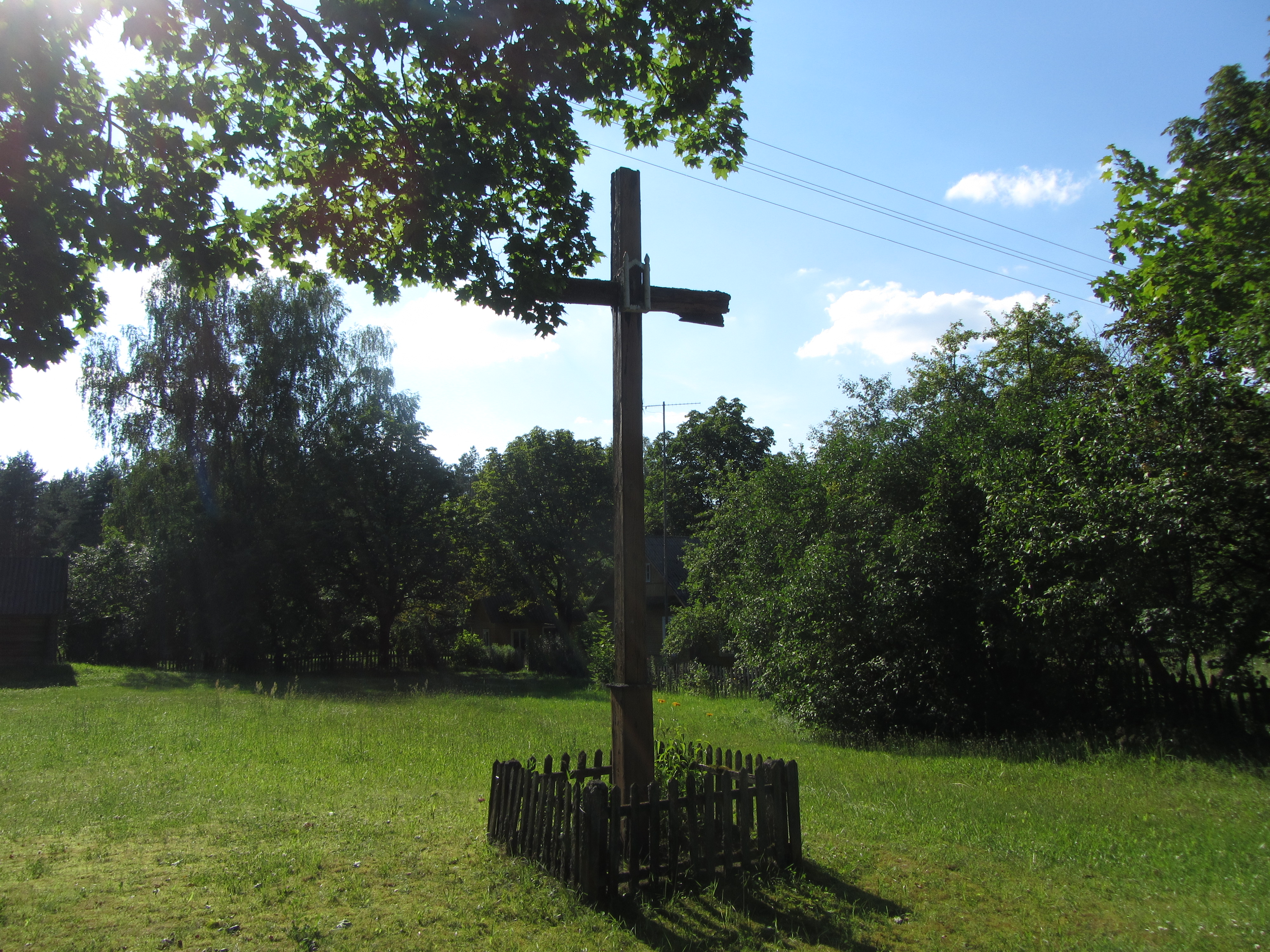 Paąžuolė 65245, Lithuania